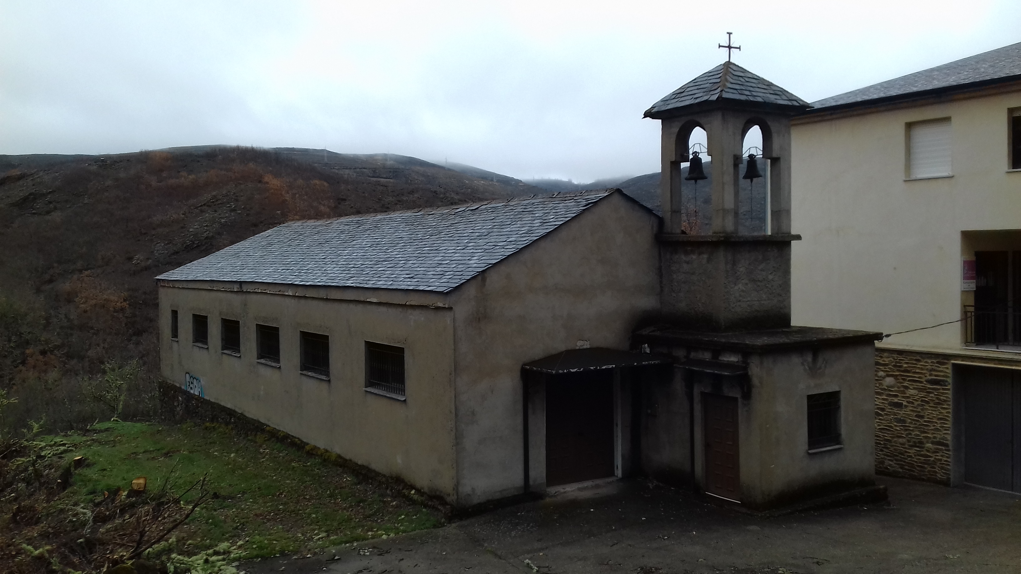 Igrexa parroquial de Pías